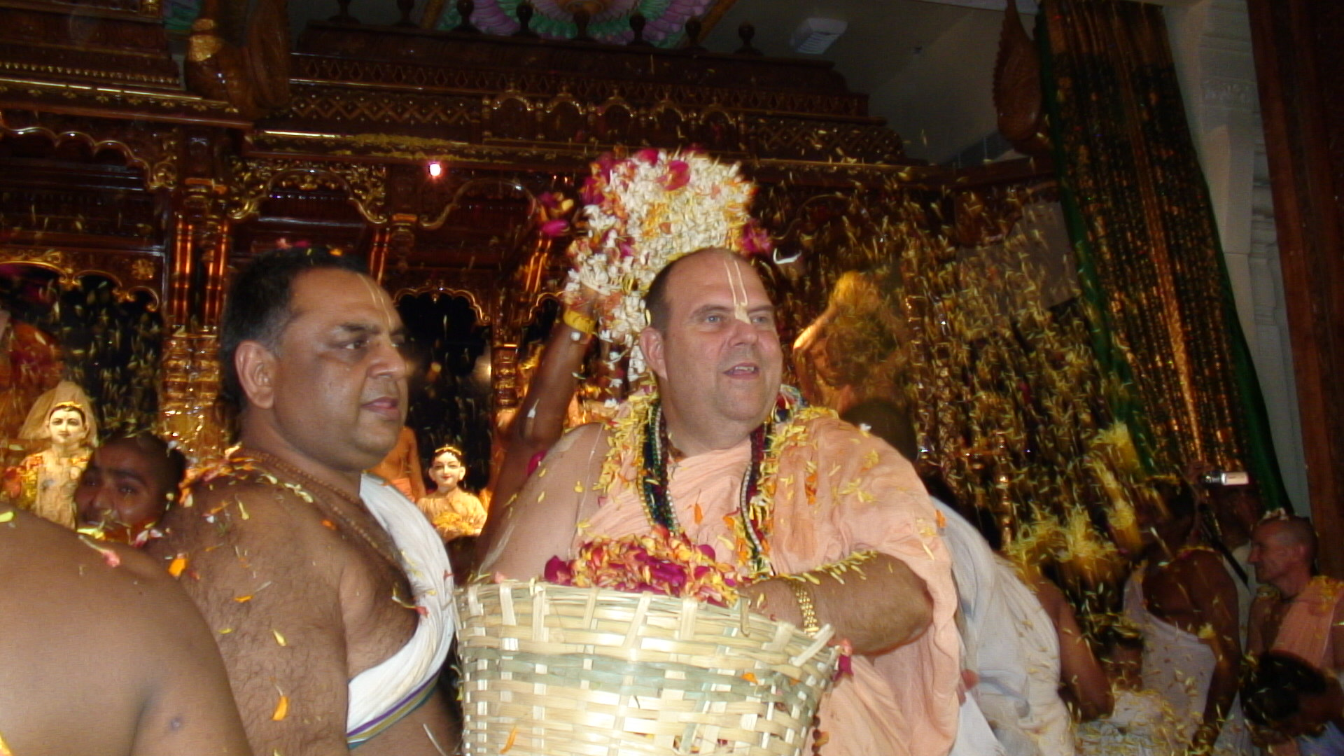 Jayapataka_Swami_Pushpa_Abhishek_Tirupati_India_2007